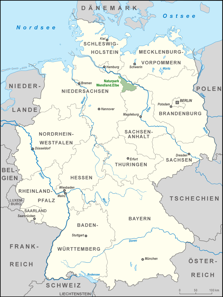 Karte des Naturparks Elbhöhen-Wendland in Deutschland, bis 2010 Naturpark Elbufer-Drawehn